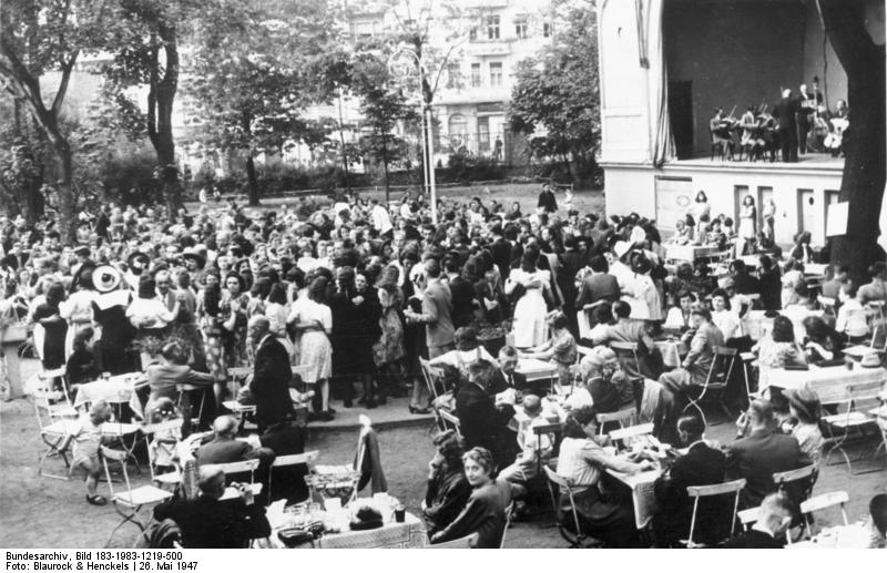 Illus Tanz im Freien am Pfingstmontag in der "Neuen Welt" Hasenheide. Fot: Blaurock & Henckels